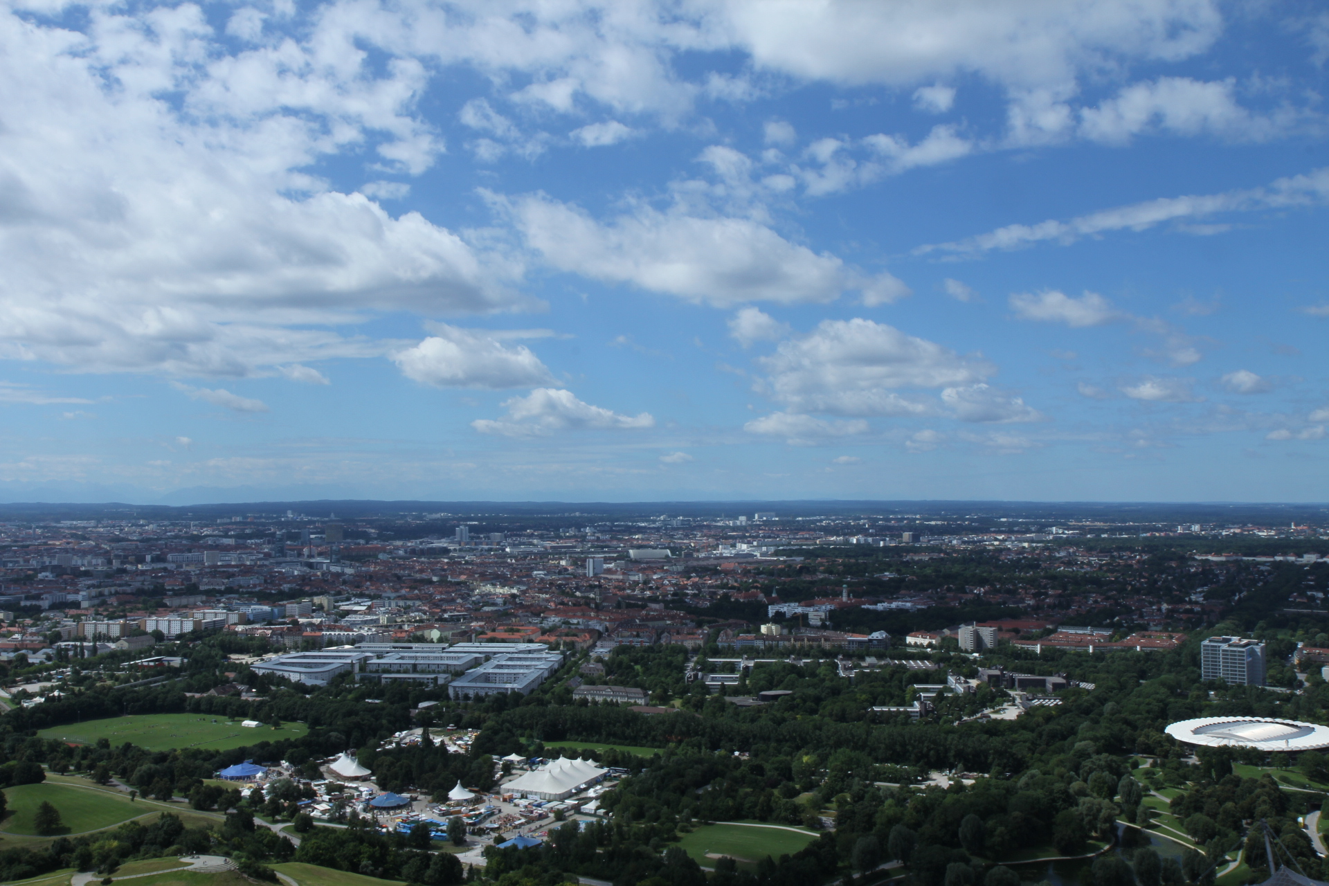 Wikipedia im Landtag – Bayern 17. bis 19. Juli 2012 in München Dieses Foto wurde im Rahmen des Projektes „Wikipedia im Landtag“ erstellt.